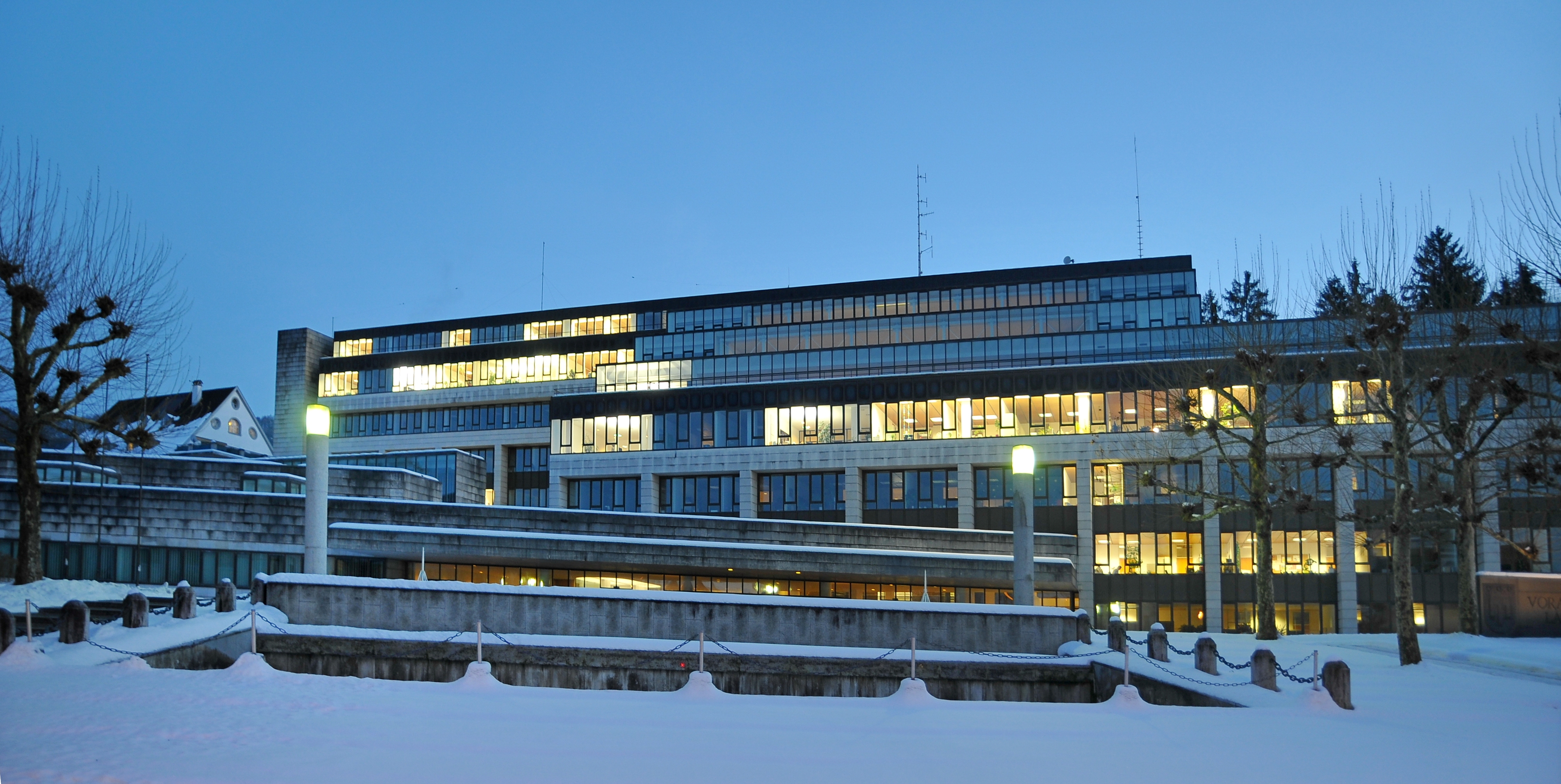 Landhaus Bregenz, Sitz der Vorarlberger Landesregierung. Erbaut in den Jahren 1977 bis 1981 nach Plänen des Architekt: Holzbauer.